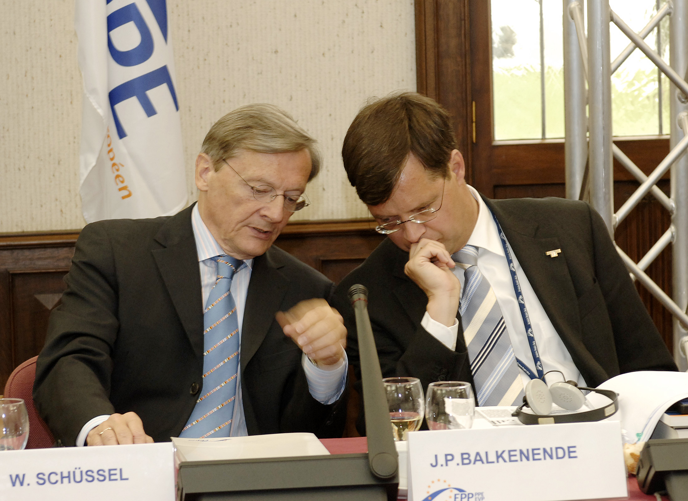 EPP Sumiit 15 May 2006